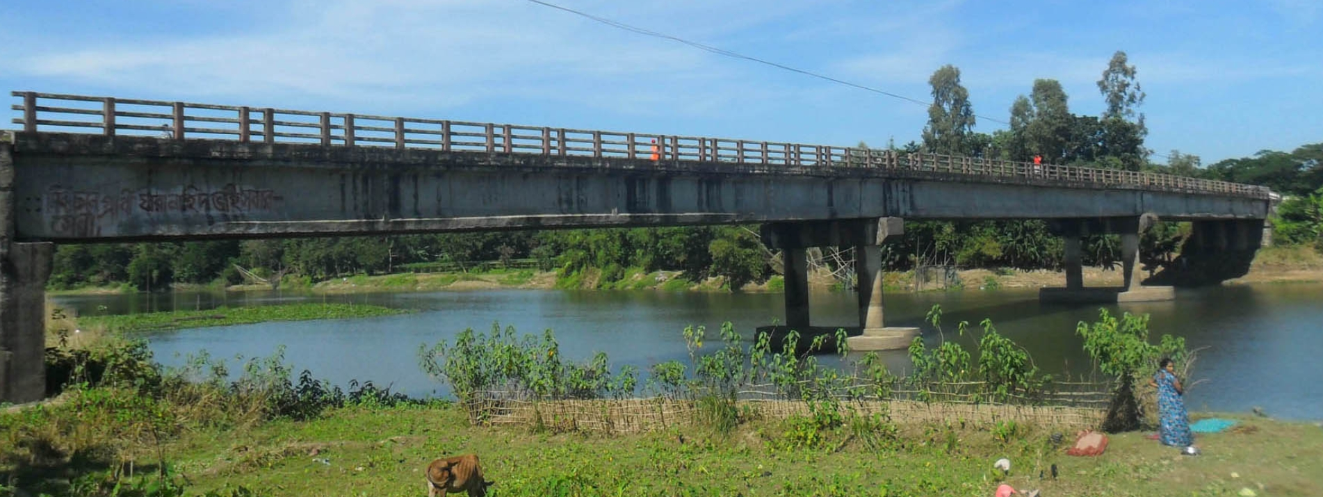 কুড়া নদীর উপর ব্রীজ